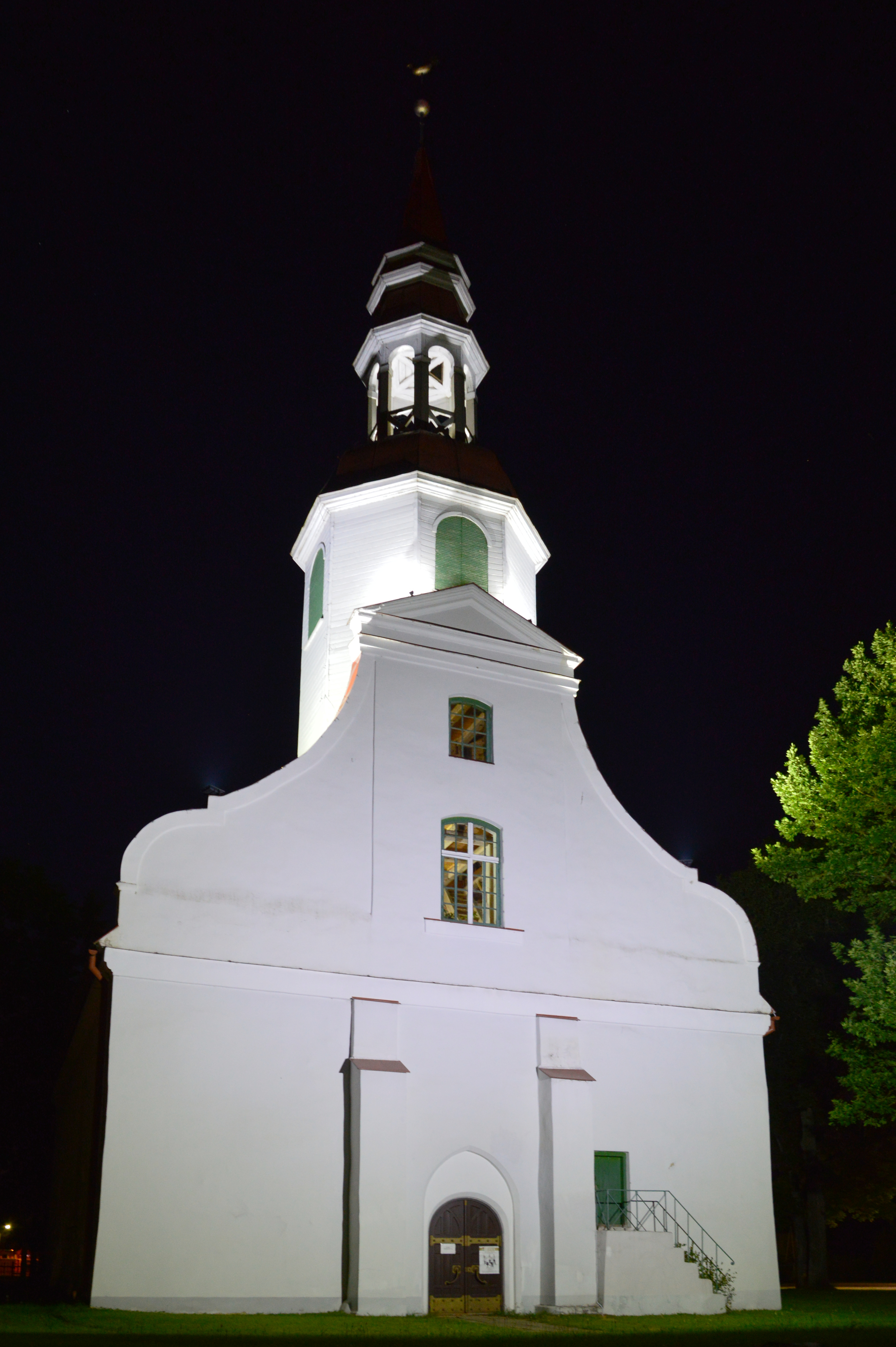 Valka Luke kirik öösel